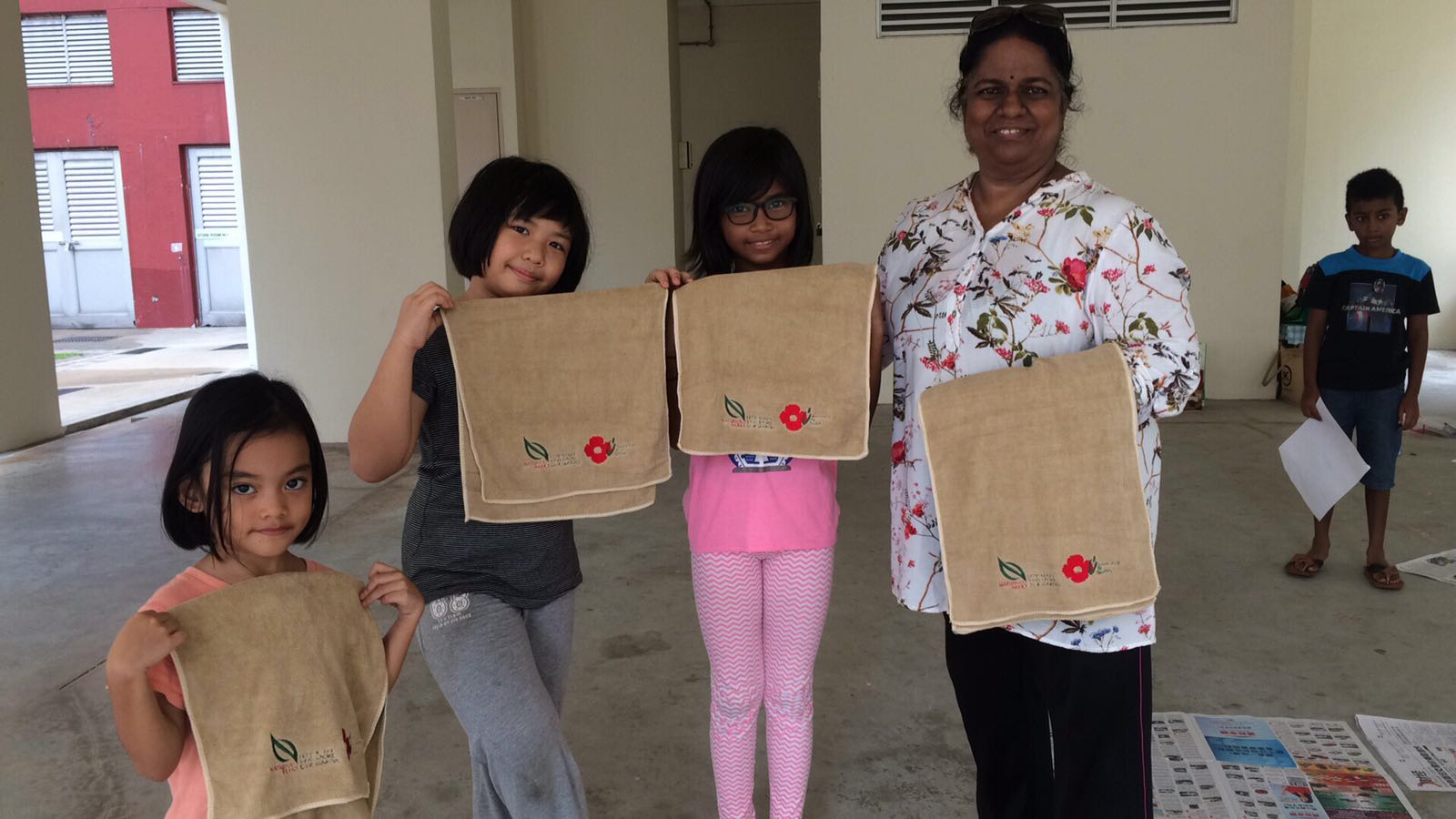 新加坡人用毛巾